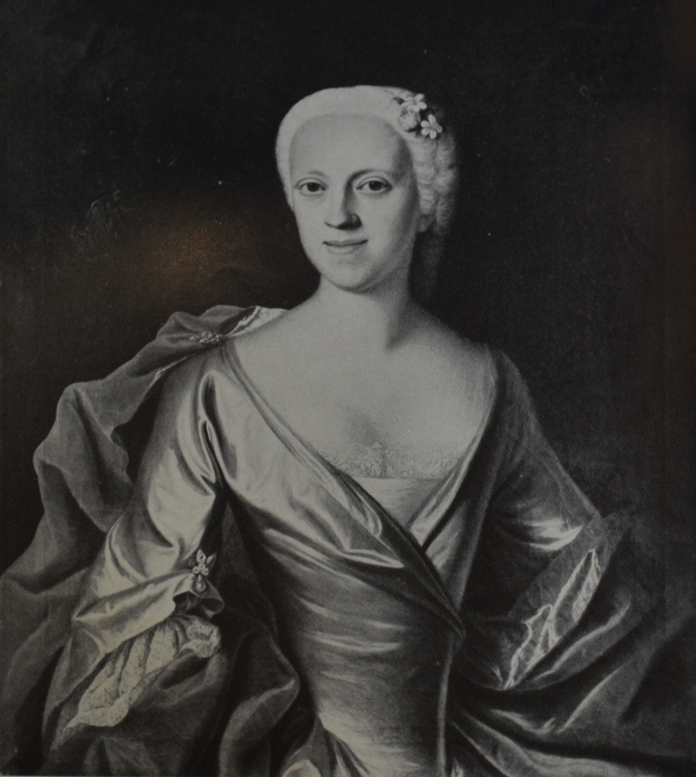 Caroline Luise von Seckendorf-Aberdar (1751–1805), Ehefrau von Carl Georg Riedesel zu Eisenbach (auch Karl) (* 21. November 1746 in Wetzlar; † 28. Januar 1819 in Stuttgart)